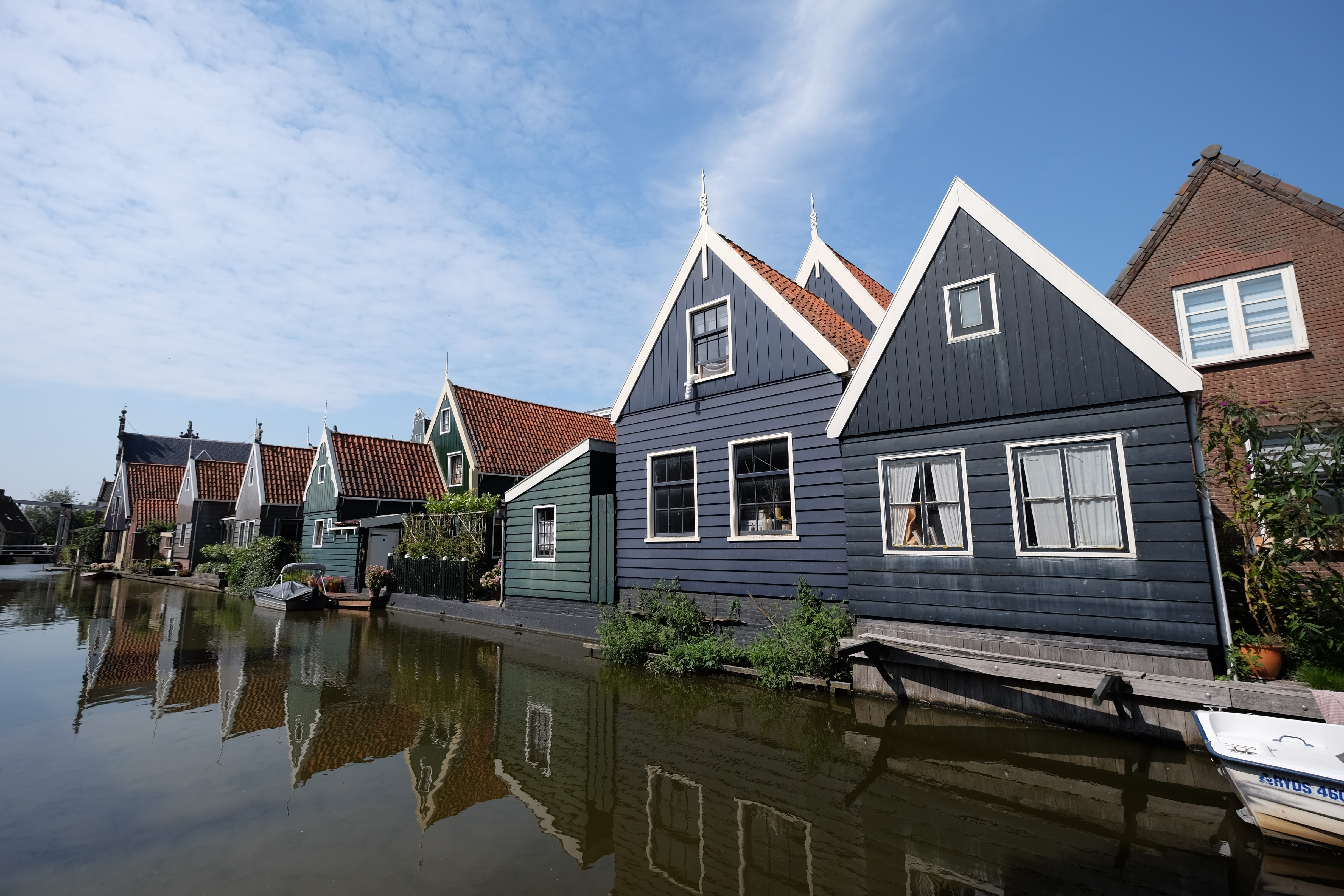 1483 De Rijp, Netherlands